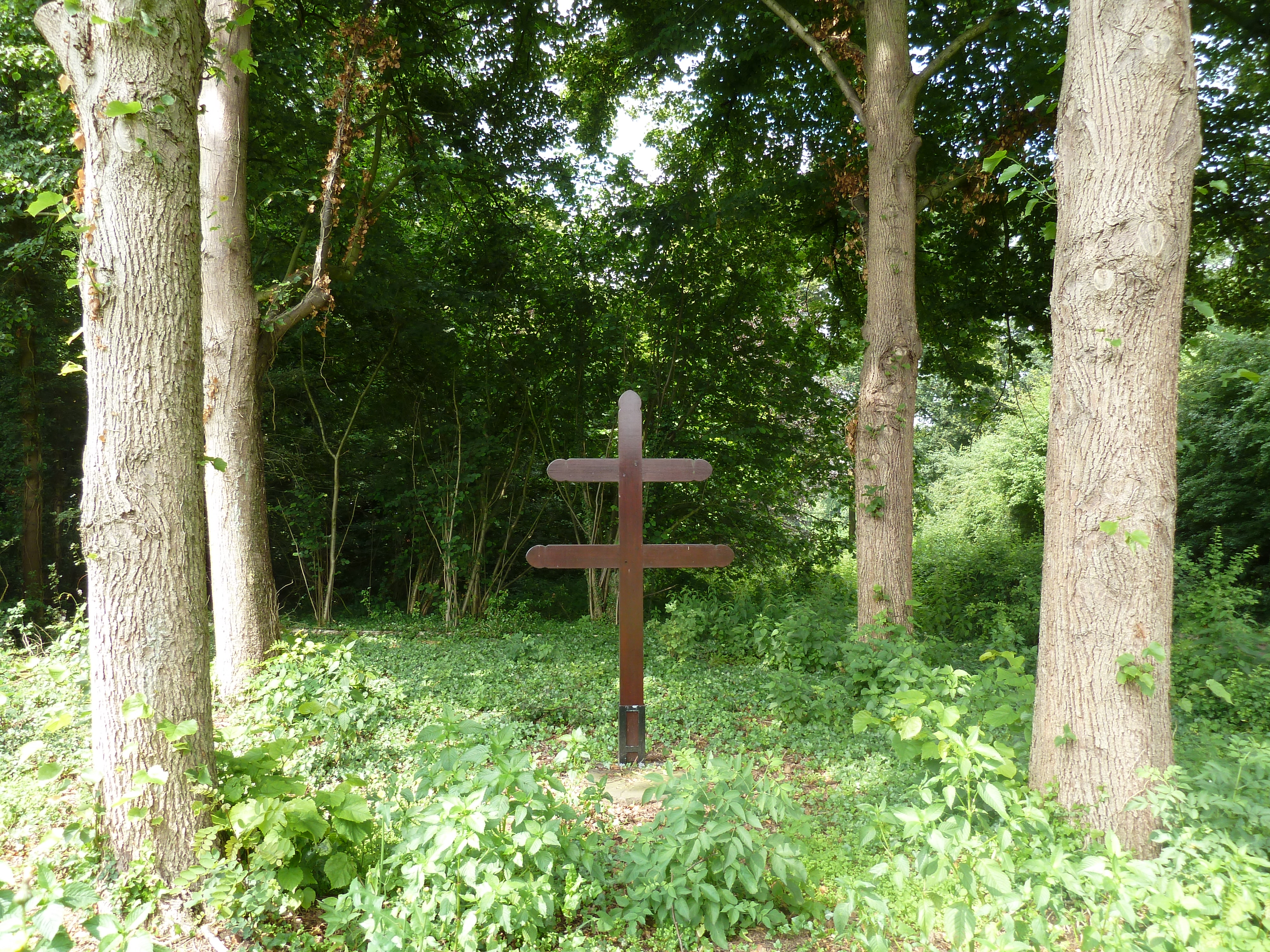 Hagelkruis Sint Odiliënberg, Roerdalen, Limburg, Nederland